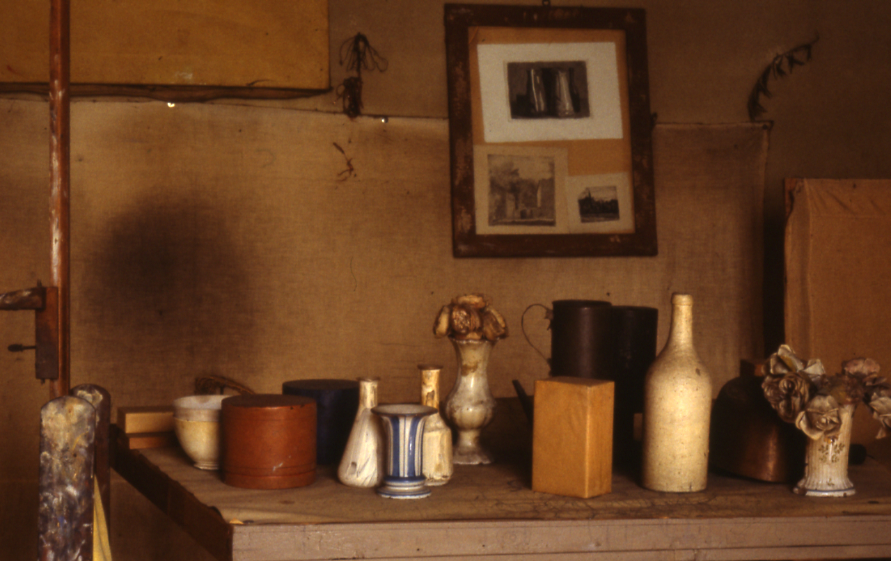 Servizio fotografico : Bologna, 1981 / Paolo Monti. - Foglio: 1, Fotogrammi complessivi: 20/20 : Diapositiva, sviluppo cromogeno/ pellicola ; 35 mm. - ((Cartoncino manoscritto nella scatola contenente queta serie riportante:"Monti. Studio Morandi. Oggetti. 16 foto". - Sullo chassis della diapositiva n.1 Monti specifica: "Studio Morandi". - Occasione: Documentazione eseguita in collaborazione con Nino Castagnoli per l'Assessorato cultura di Bologna in occasione della mostra Morandi in USA (luoghi appenninici e studio del pittore). - Fonte: Agenda di Paolo Monti: Diapositive 24x36mm (1948-1982), presso Archivio Paolo Monti. - Fonte: Fattura di Paolo Monti: IV. Commesse/ Fattura n. 36 (1981/10/22), presso Archivio Paolo Monti